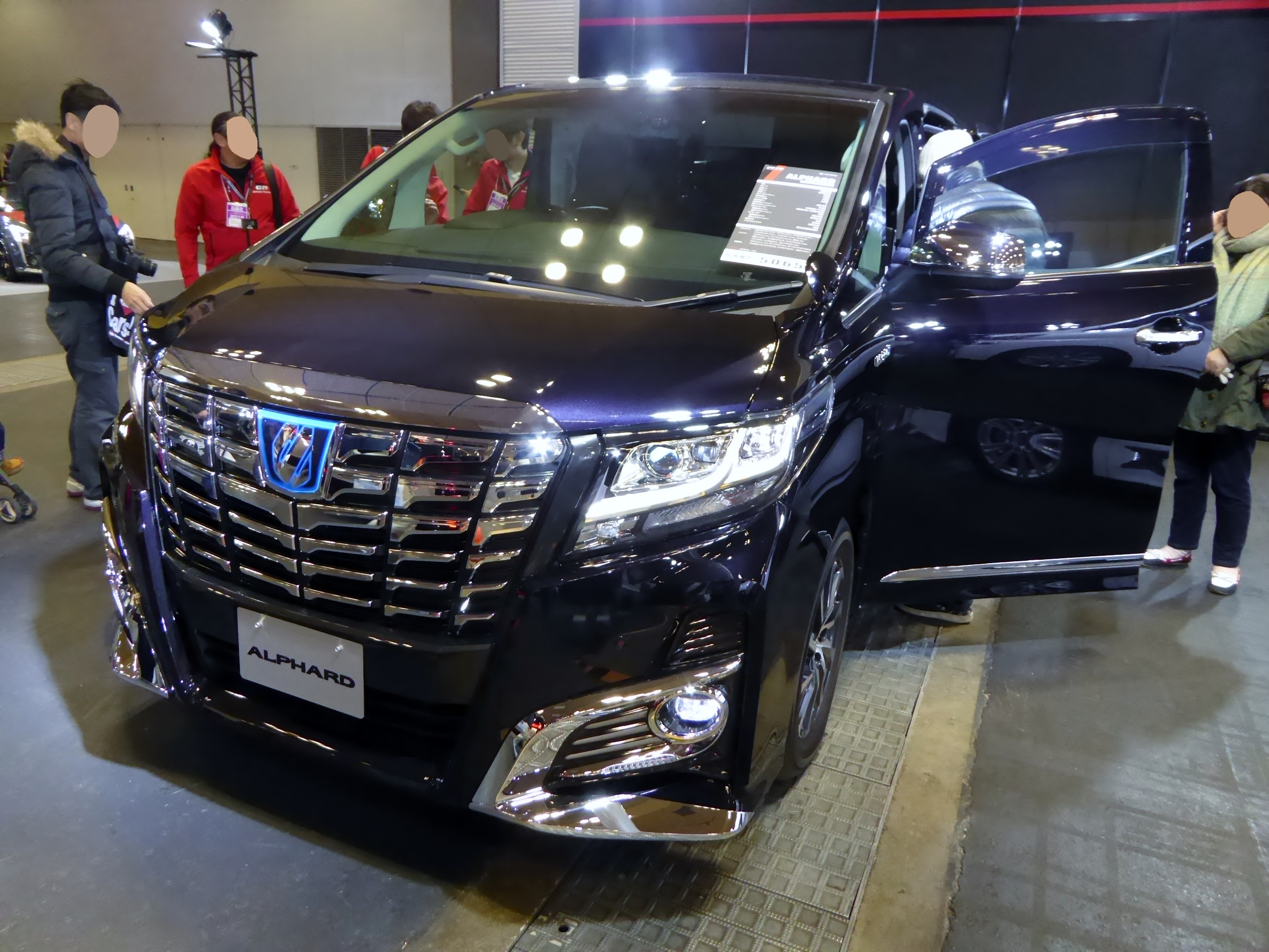 大阪オートメッセ2015においてH30W型トヨタ・アルファードハイブリッドSR"Cパッケージ"を撮影。